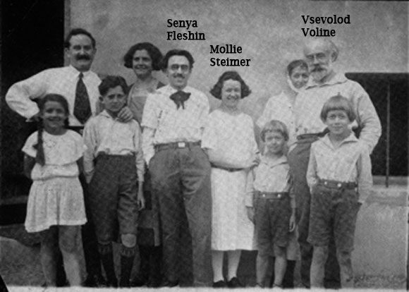 Senya Fleshin - Voline - Mollie Steimer sans doute en France dans les années 30